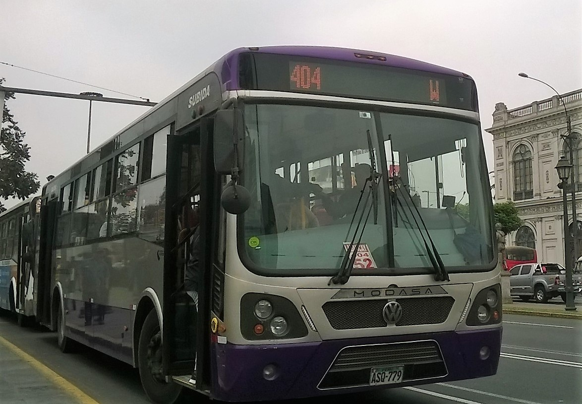 Autobús del Corredor Morado